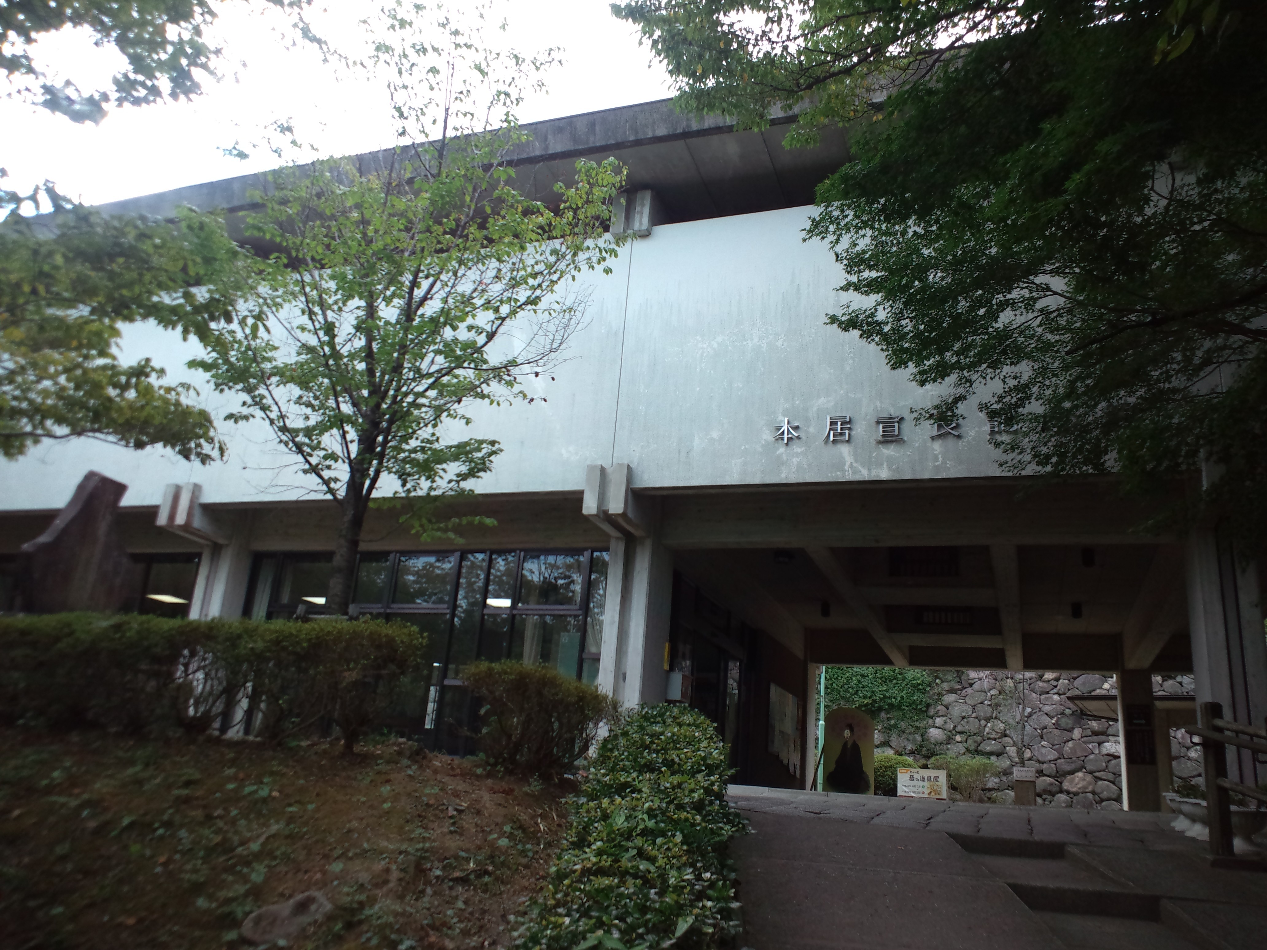 本居宣長記念館（三重県松阪市）